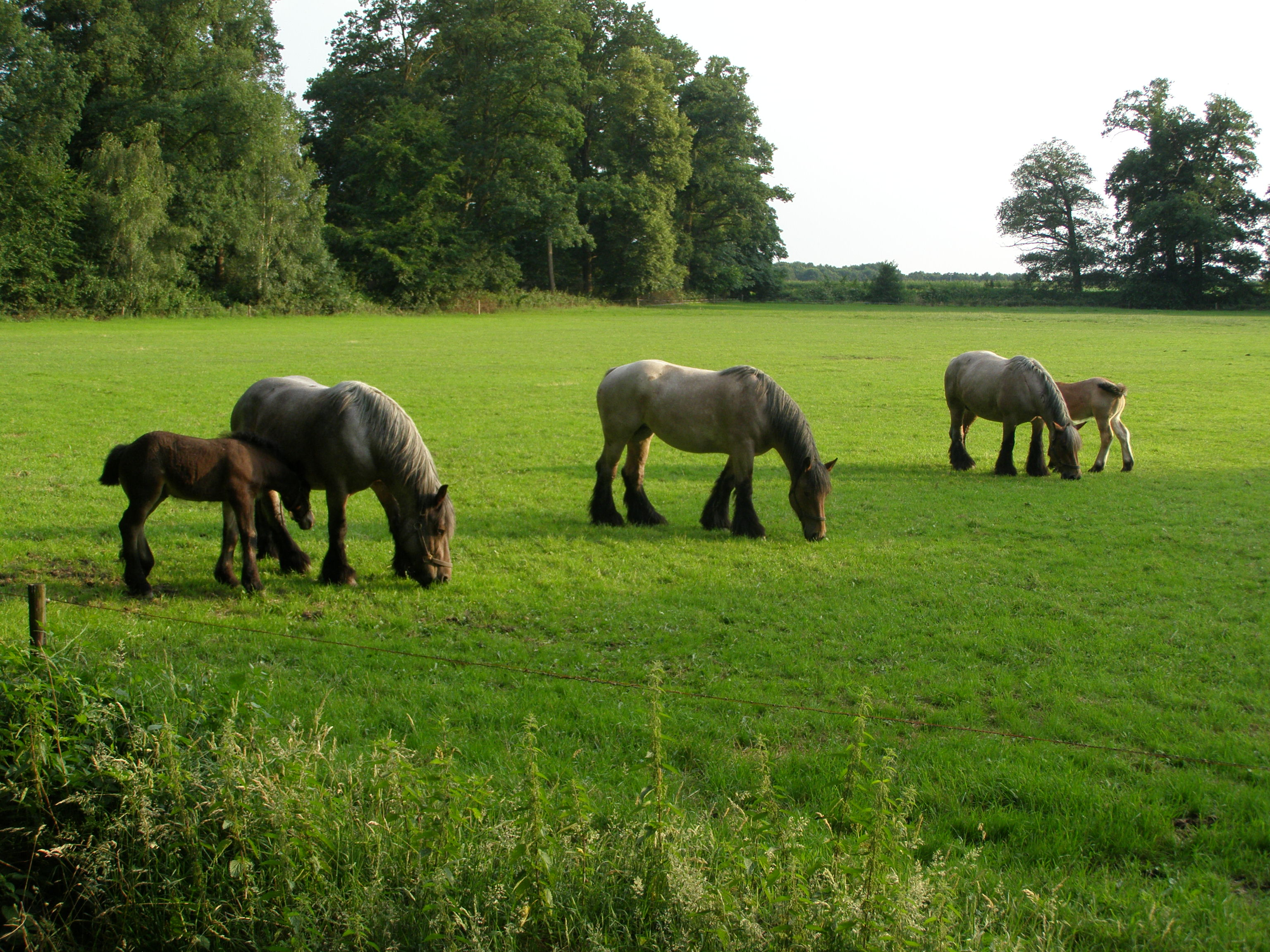 eigen werk